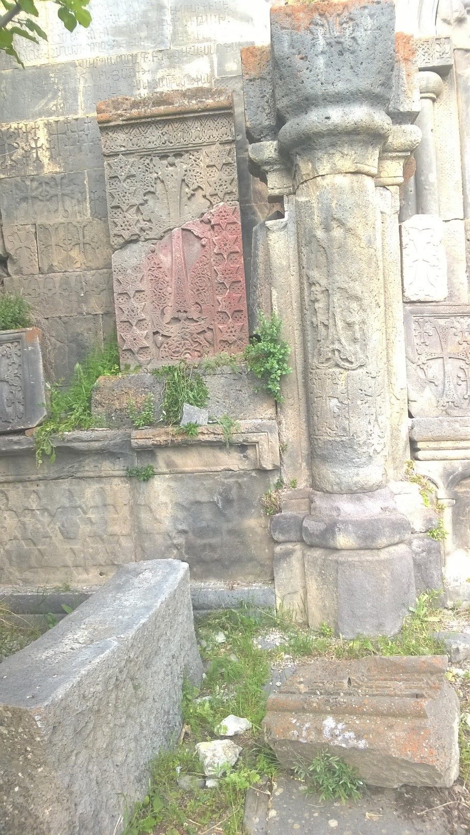 Խոսրով